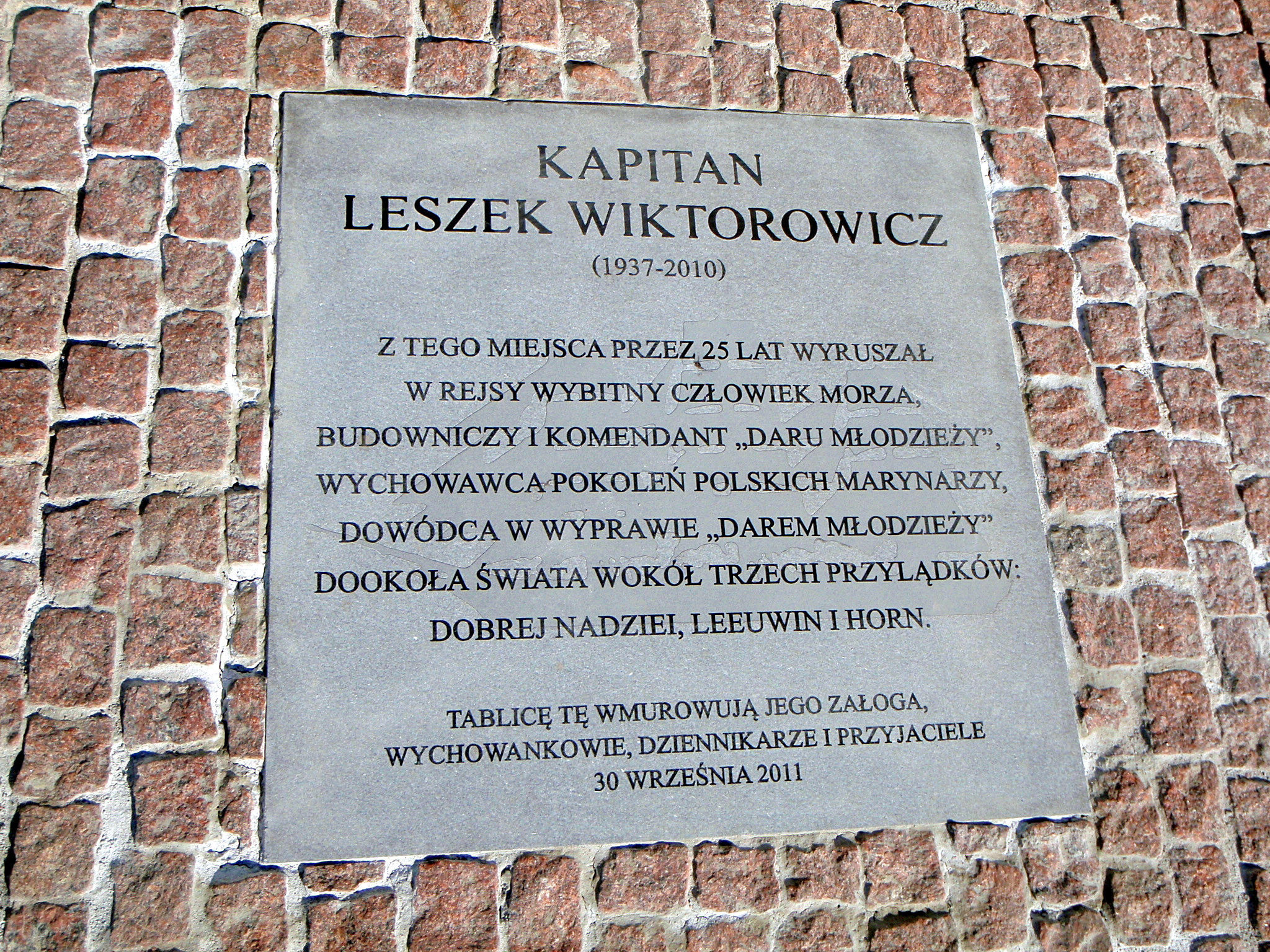 Tablica pamięci Kapitana Leszka Wiktorowicza w Gdyni przy Skwerze Kościuszki, w miejscu cumowania "Daru Młodzieży".